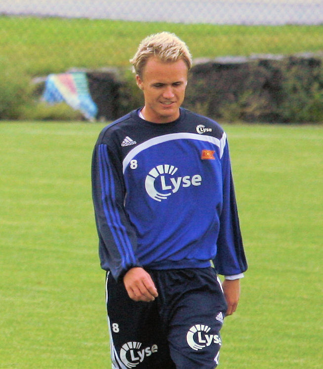 Vidar Nisja